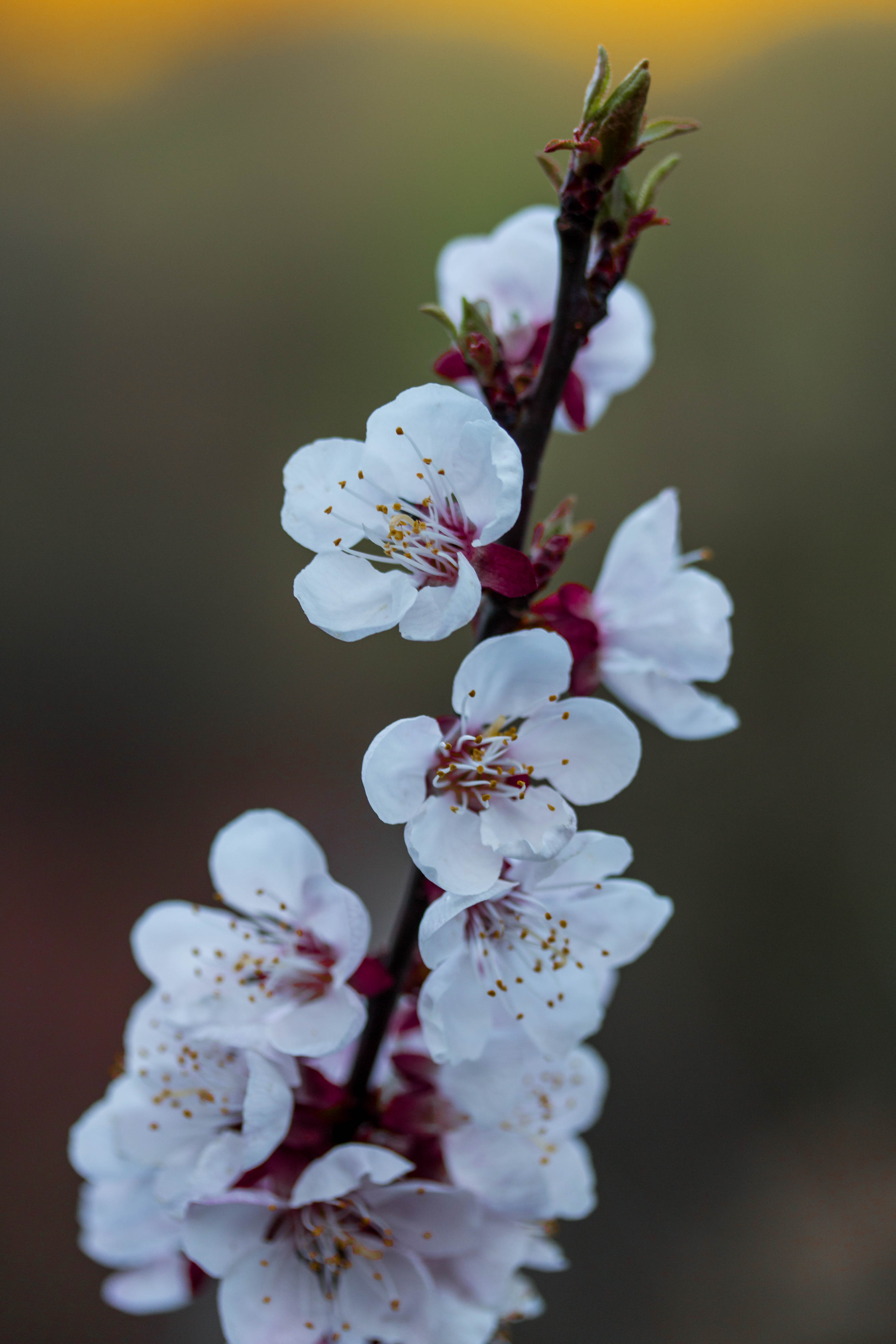 Marillenblüten